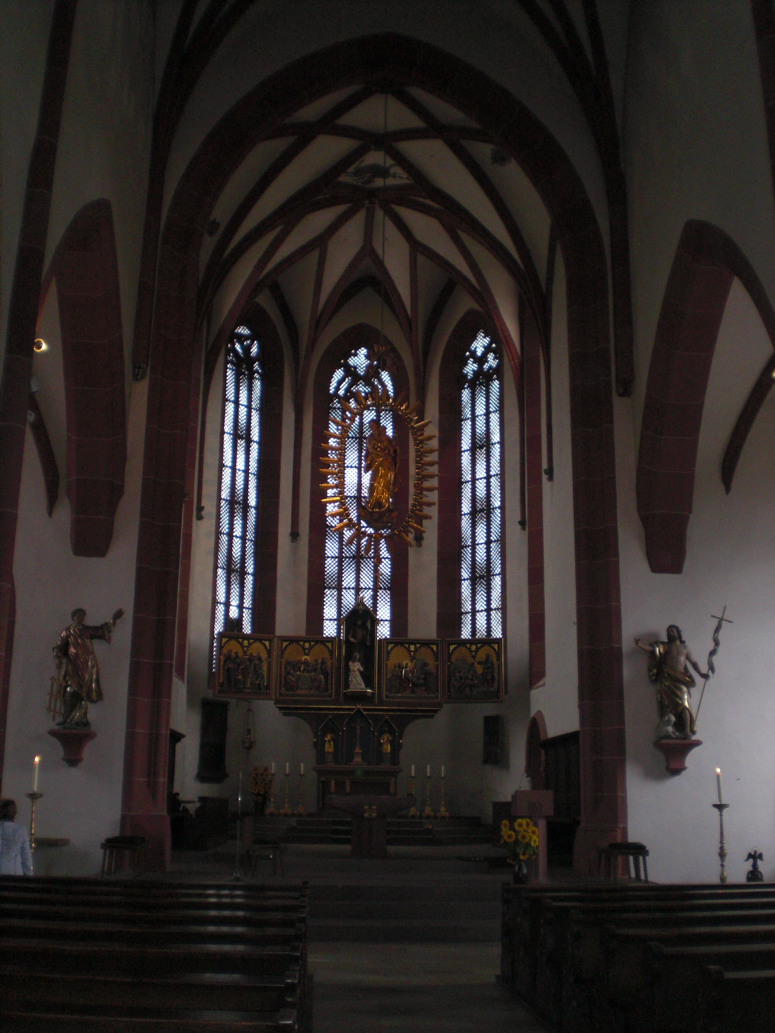 Innenansicht der katholische Stadtpfarrkirche in Hammelburg